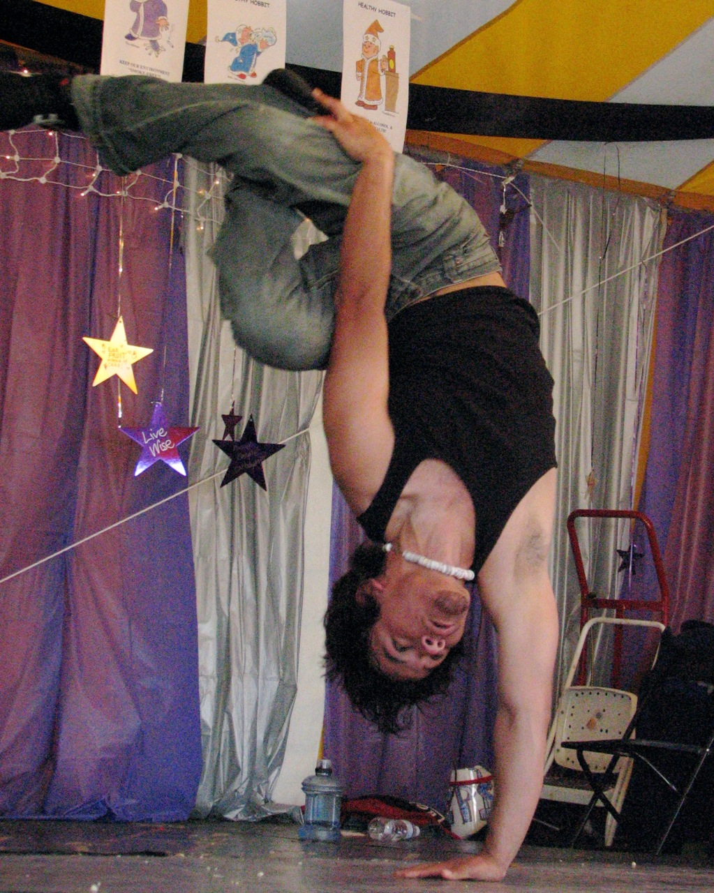 Sebuah gaya handstand dengan satu tangan ,biasanya digunakan sebagai bagian freeze.